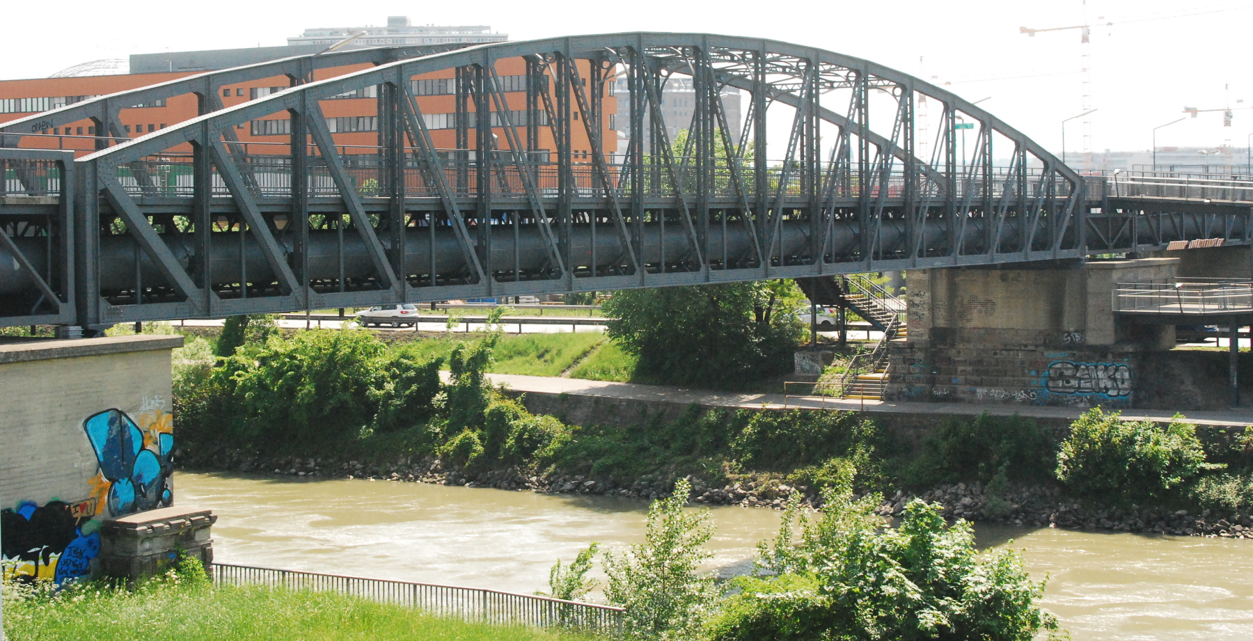 Gaswerksteg im 3. Wiener Gemeindebezirk Wien-Landstraße über den Donaukanal